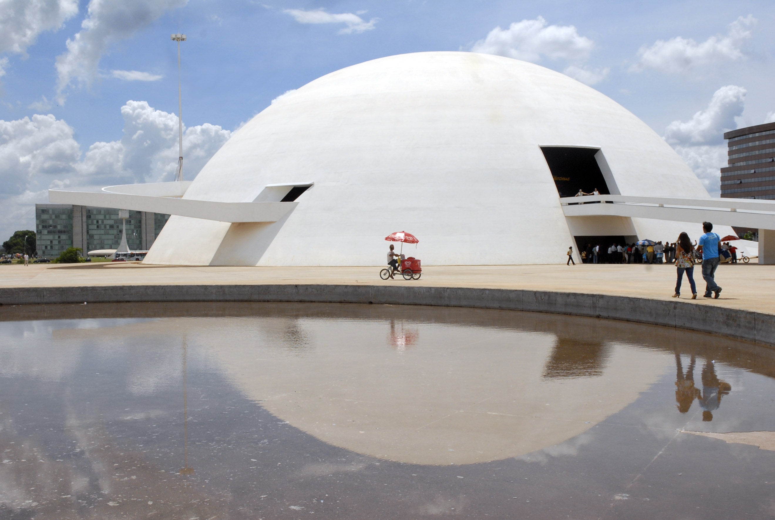 Brasília - Vista do Museu Nacional do Conjunto Cultural da República, onde se realizou a cerimônia de comemoração dos 20 anos do tombamento de Brasília como Patrimônio Cultural da Humanidade